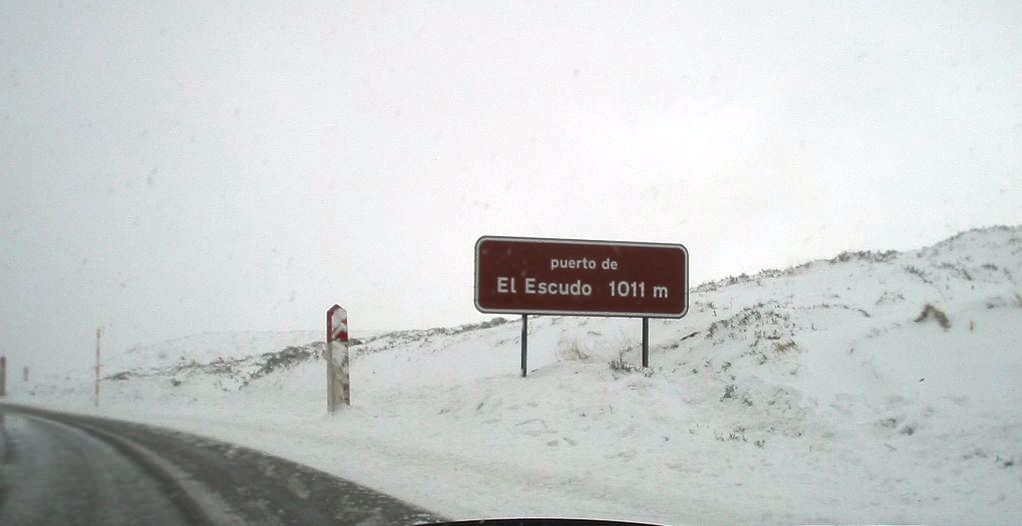 Puerto de El Escudo (Cantabria, España)